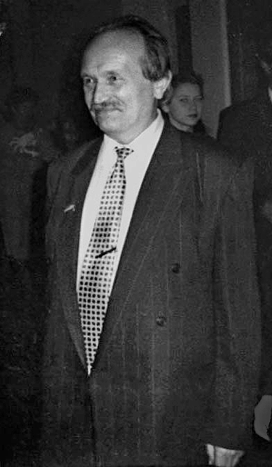 Черновол Вячеслав Максимович с супругой на просмотре документальных фильмов из истории становления Независимости Украины в Киевском Доме кино